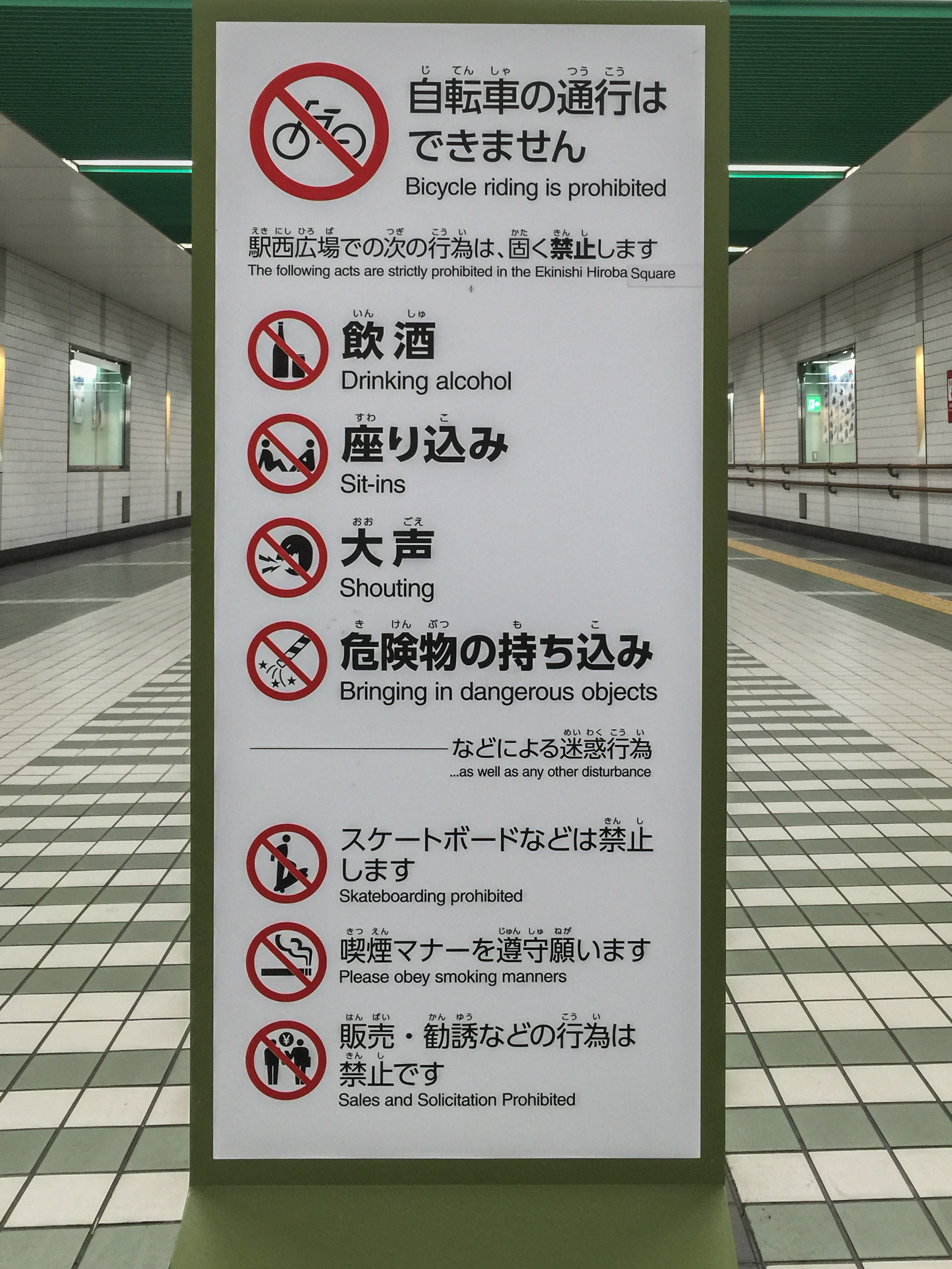 金沢駅西広場。金沢駅に隣接した公共広場。